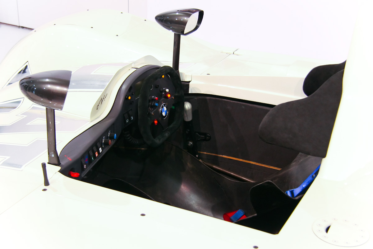 Jenny Holzer创作的1999 BMW V12 LMR。